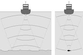 Schema semplificato della tecnica del suono riflesso nave-fondo-nave